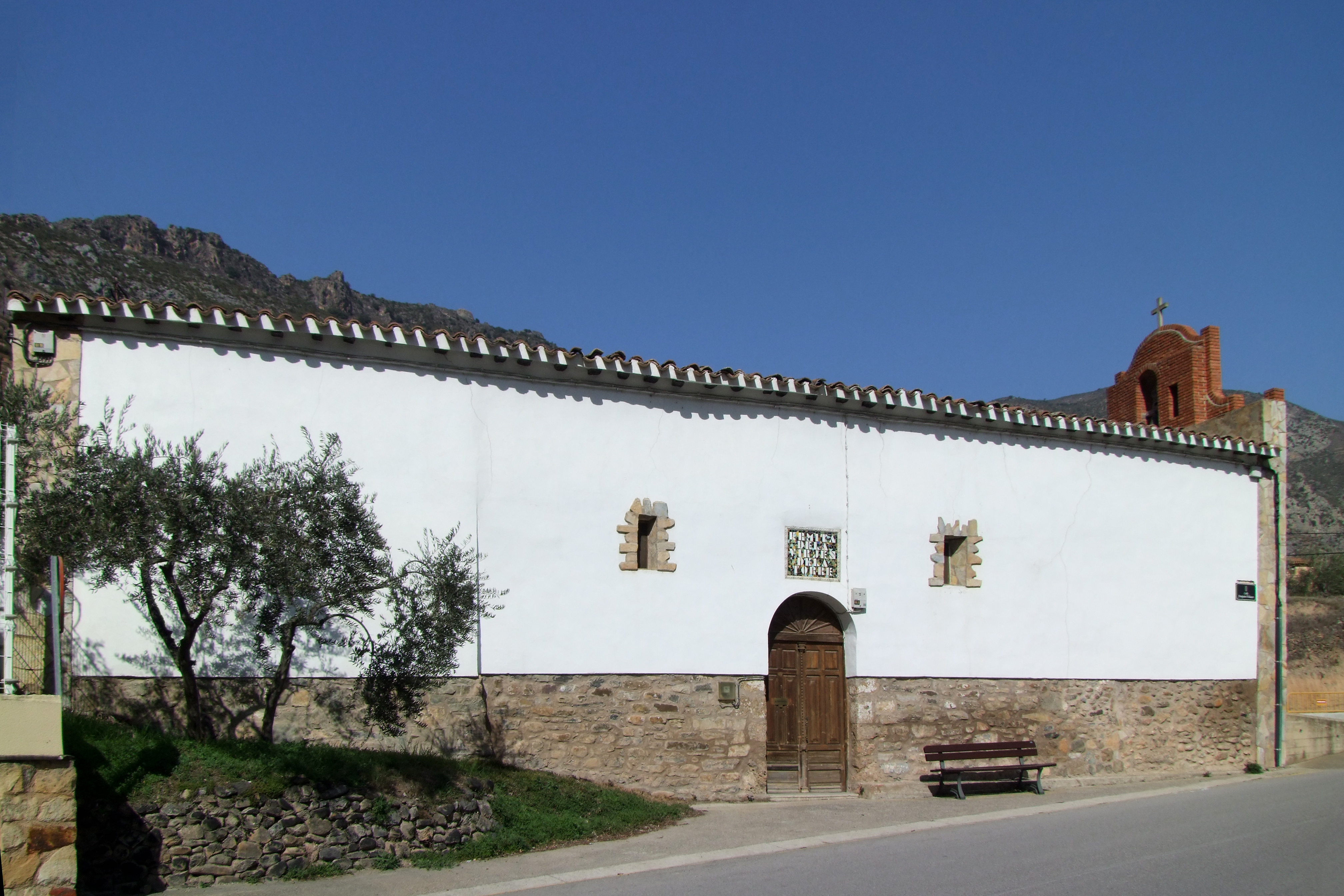 Ermita de la Virgen de la Torre en la localidad de Arnedillo, La Rioja - España